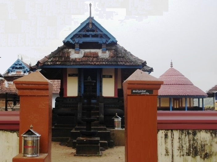 അഞ്ചുമൂർത്തിക്ഷേത്രം വിഷ്ണുപ്രതിഷ്ഠ(നകുല-സഹദേവ)